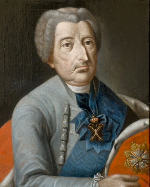 August Czartoryski (1697-1782)